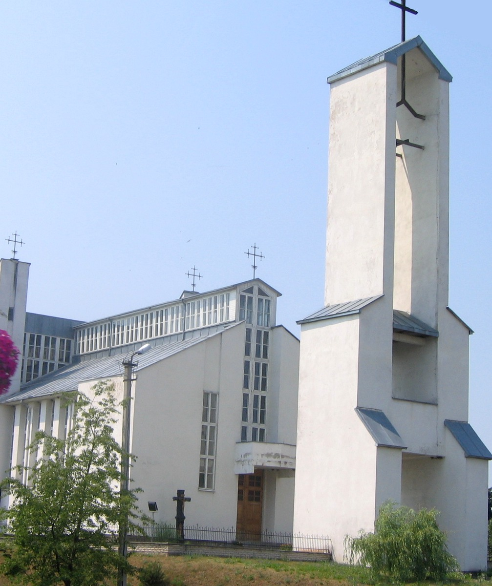 Autoriaus nuotrauka. 2006.07.11. Senoji Varėna: bažnyčia